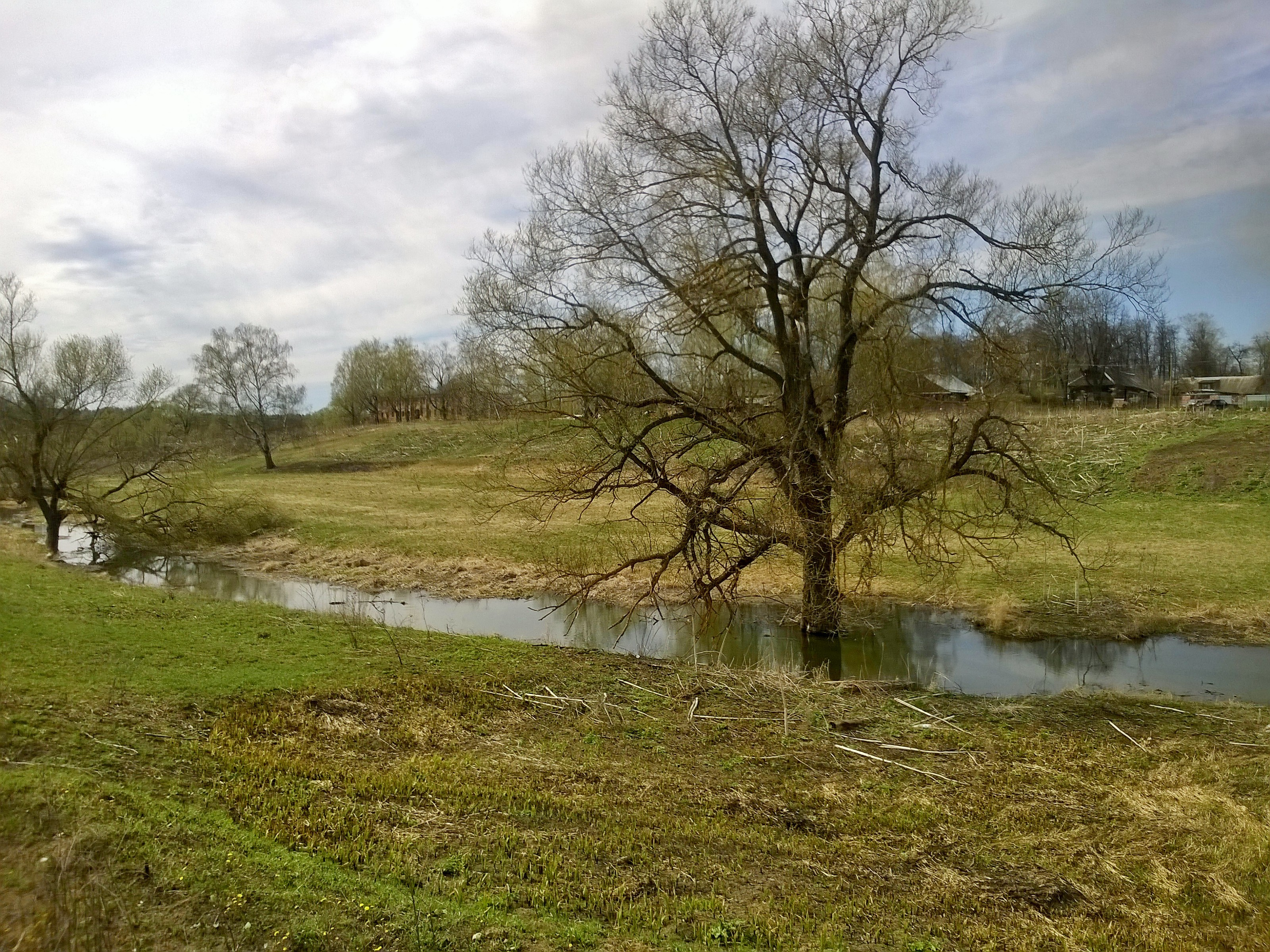 Река Колпяна в селе Белая Колпь Шаховского района Московской области